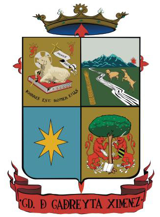 Escudo de armas de Cadereyta Jimenez.